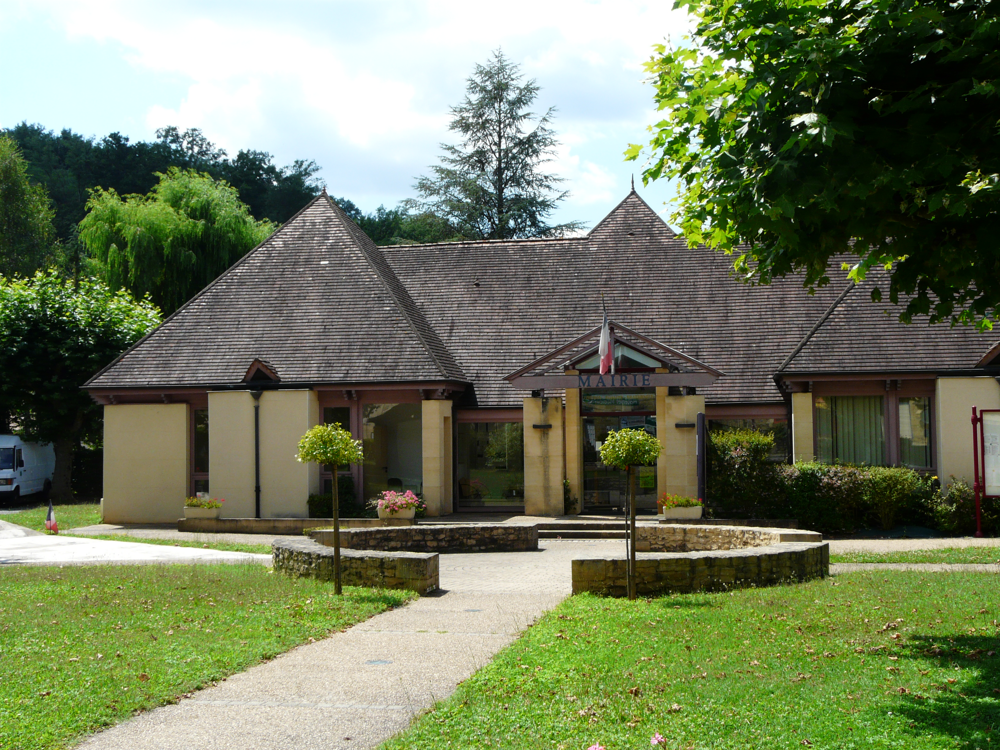 La mairie de Cénac-et-Saint-Julien, Dordogne, France.